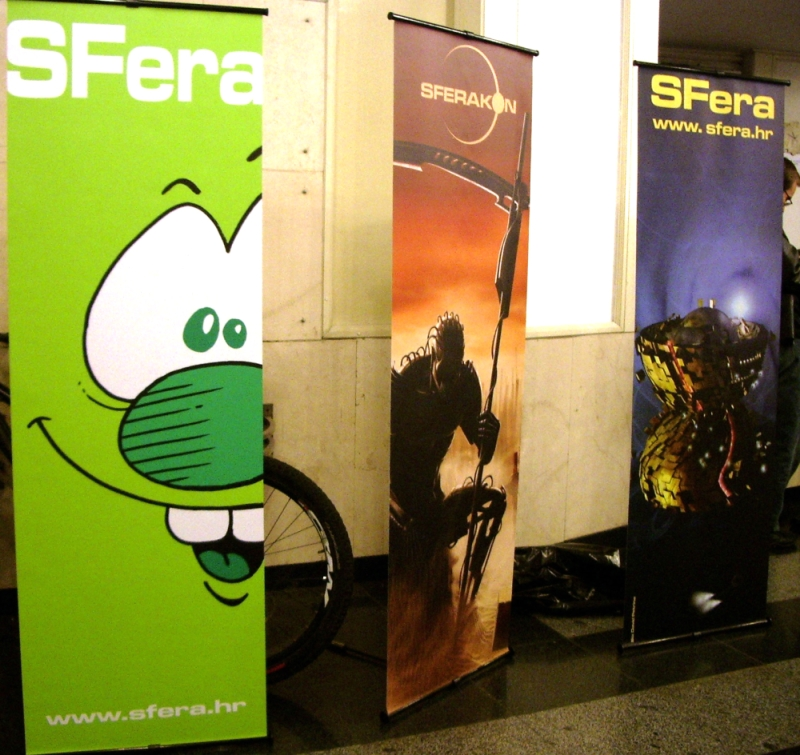 SFeraKon 2009.